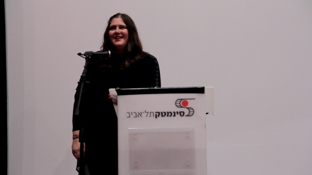 עינת פרנבך בן אהרון